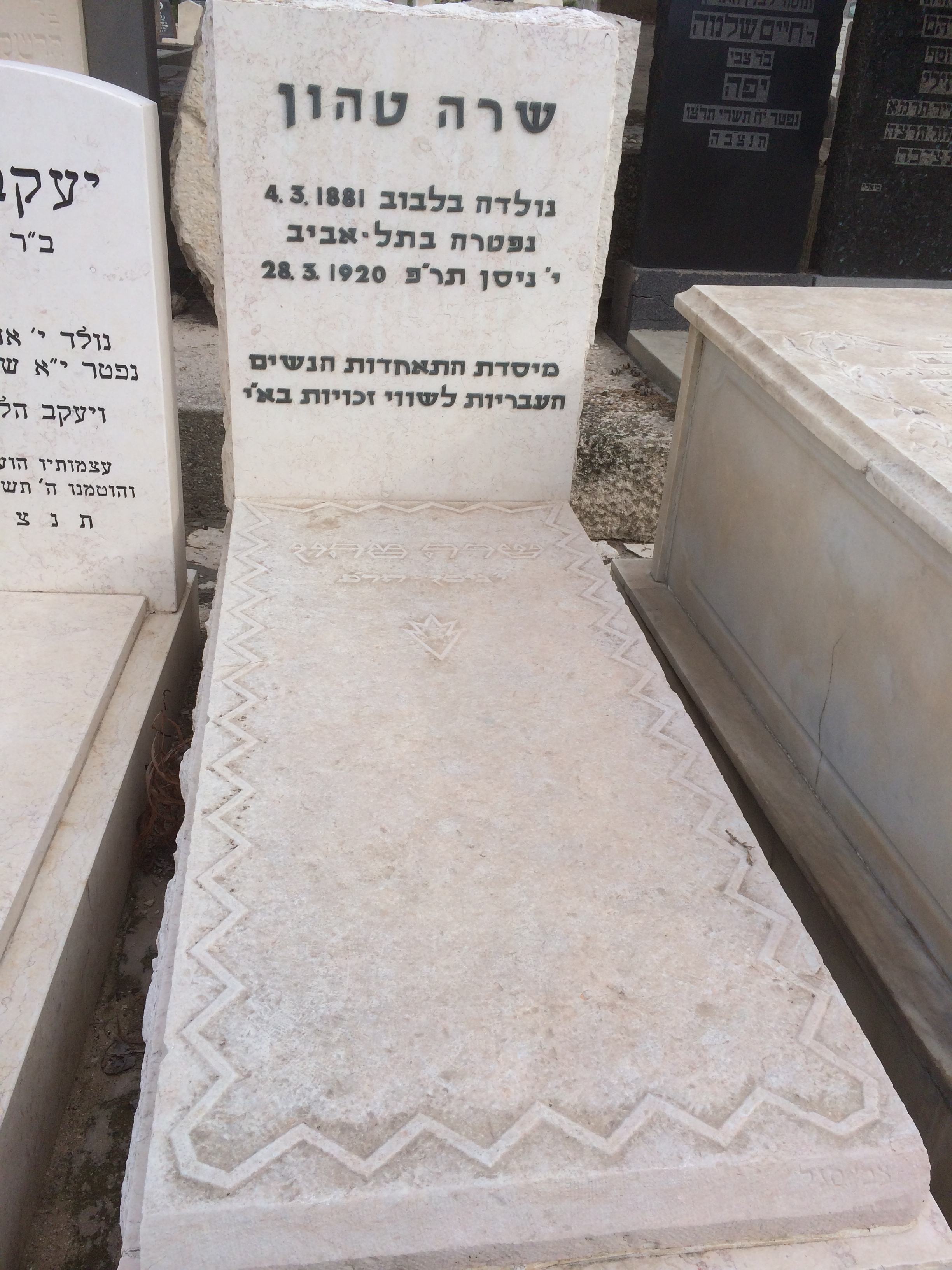 קברה של שרה טהון בבית הקברות טרומפלדור בתל אביב בסיס הקבר הוא מהמצבה המקורית שנעשתה ב 1920